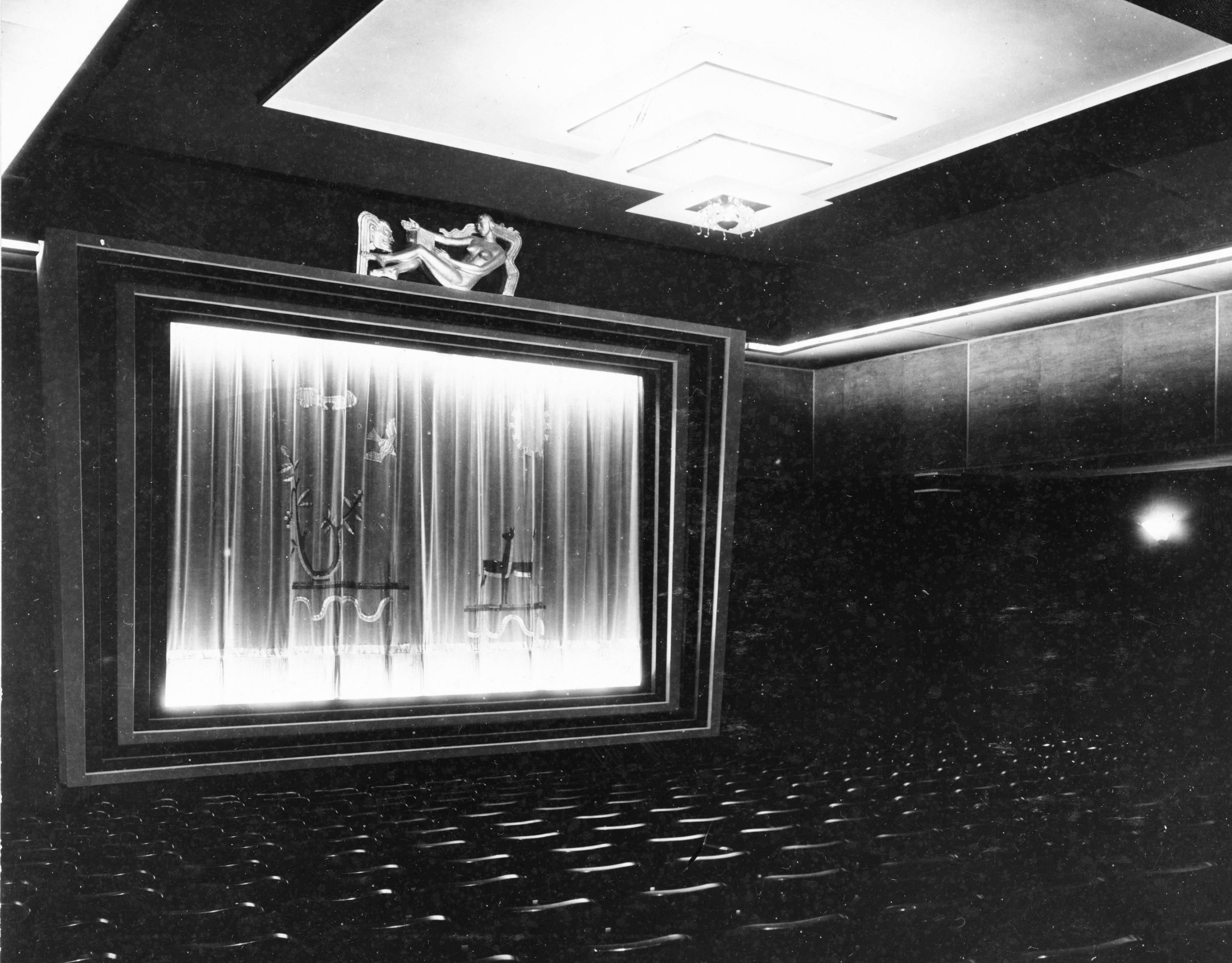 Biograf Plaza interiör, arkitekt Björn Hedvall